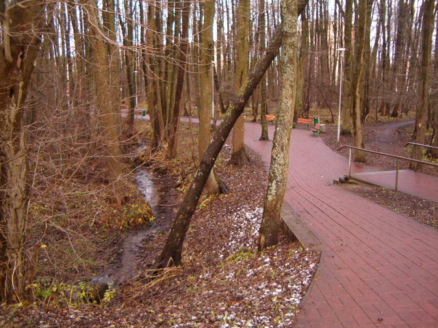 Lepistiku park